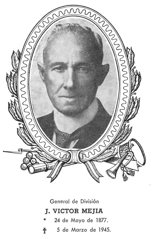 Foto de Jose Victor Mejia De Leon